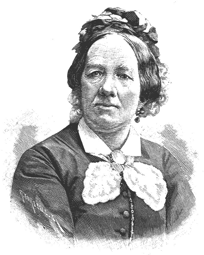 Wilhelmina Gravallius (1807-1884)